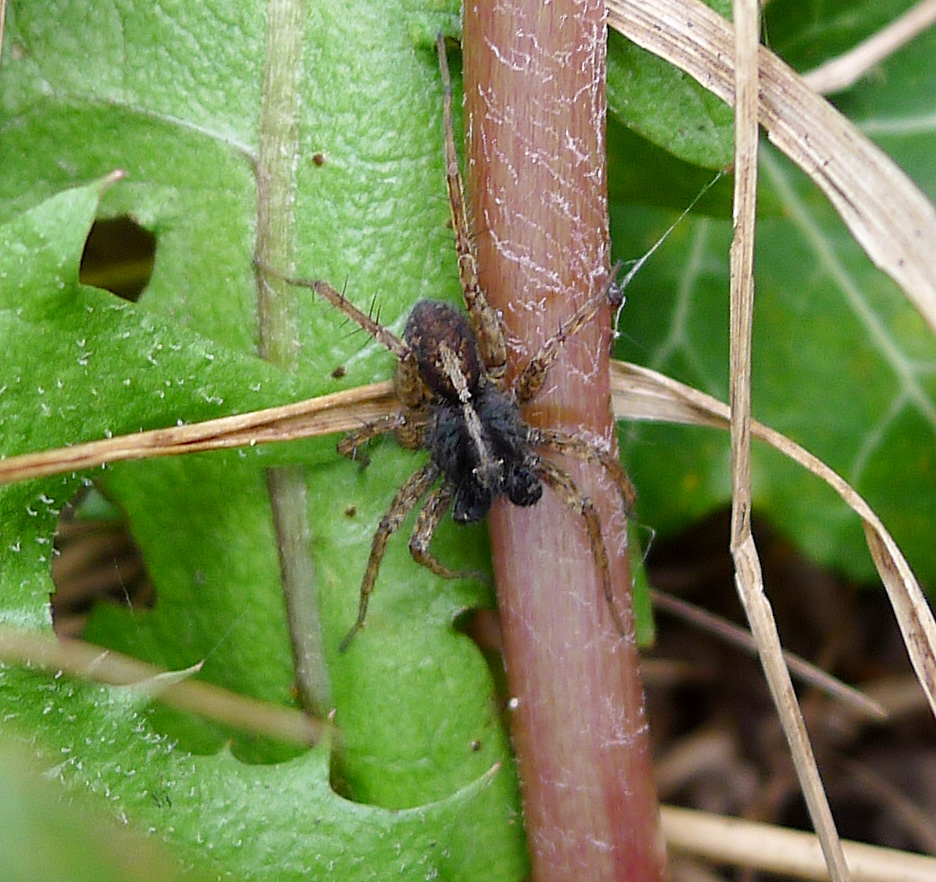 Pardosa hortensis? Male. Lycosidae